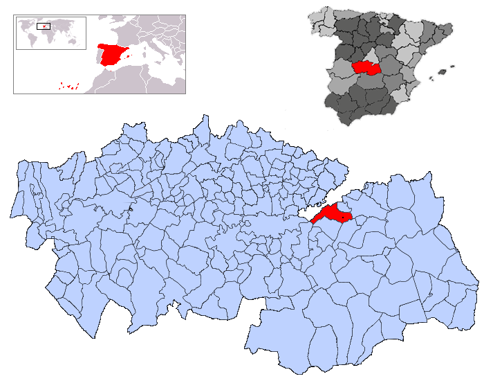 Yepes en la provincia de Toledo